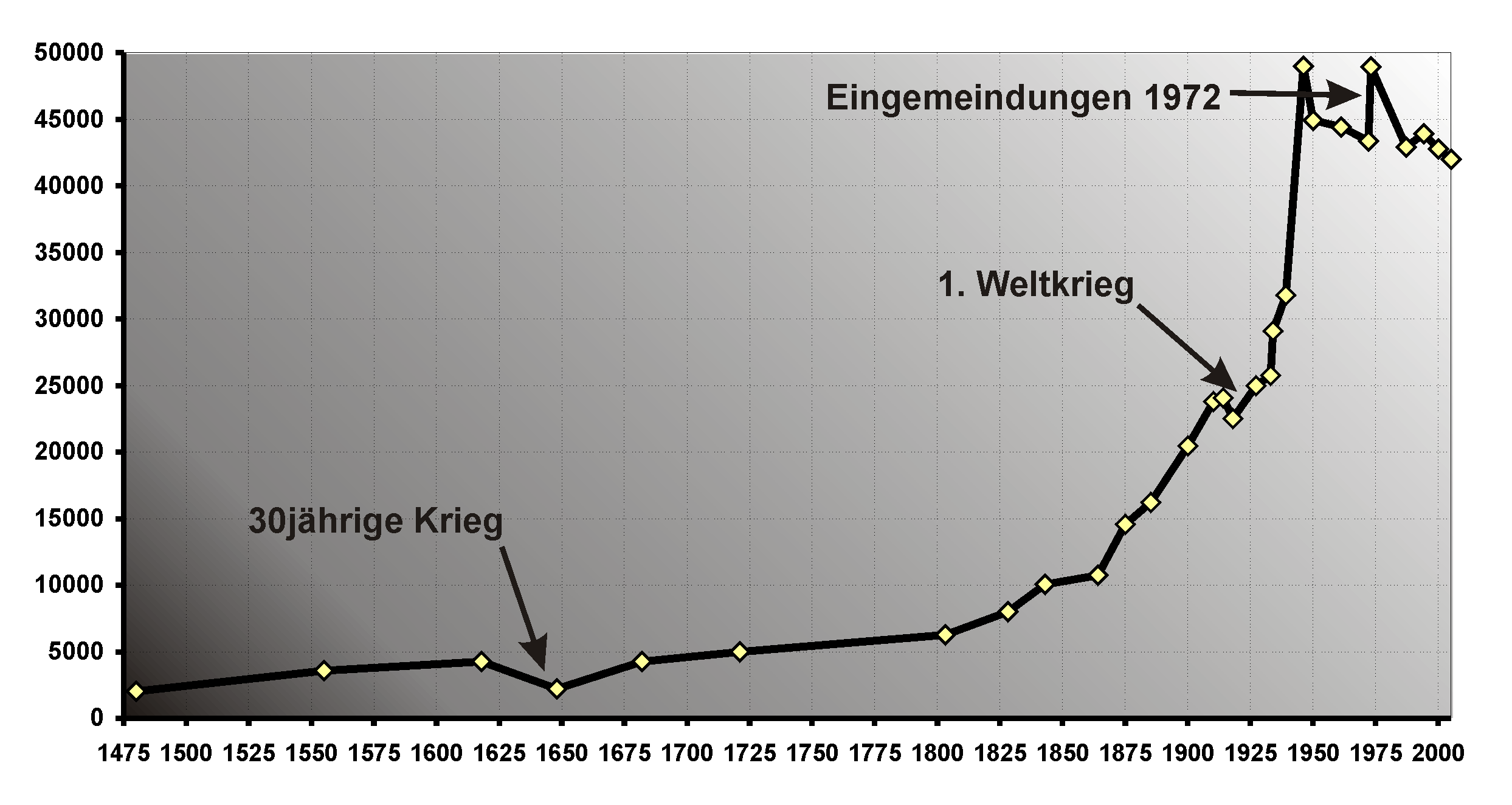 Entwicklung der Einwohnerzahl Coburgs Quellen: Werner Nährlich:Stadtgeographie von Coburg, Raumbeziehung und Gefügewandlung der fränkisch-thüringischen Grenzstadt. Palm & Enke, Erlangen 1961, S. 121 (1480 bis 1960) Harald Sandner: Coburg im 20. Jahrhundert. Die Chronik über die Stadt Coburg und das Haus Sachsen-Coburg und Gotha vom 1. Januar 1900 bis zum 31. Dezember 1999 – von der „guten alten Zeit“ bis zur Schwelle des 21. Jahrhunderts. Gegen das Vergessen. Verlagsanstalt Neue Presse (1900 bis 2000) Statistische Jahrbuch für Bayern 2011 (Ab 2000)